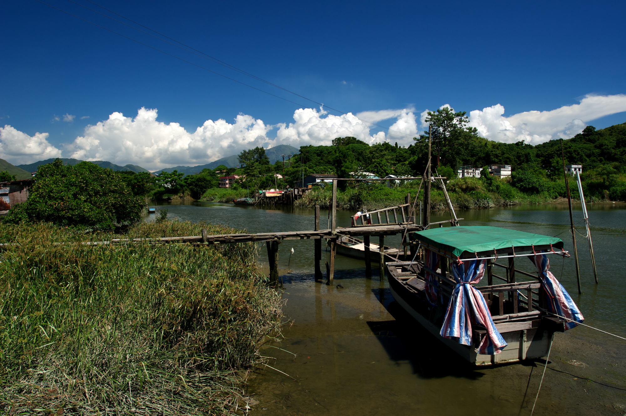 南生圍 Nam Sang Wai